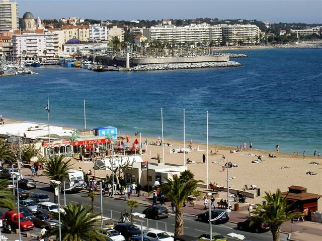 Fréjus-Plage au niveau du boulevard de la Libération